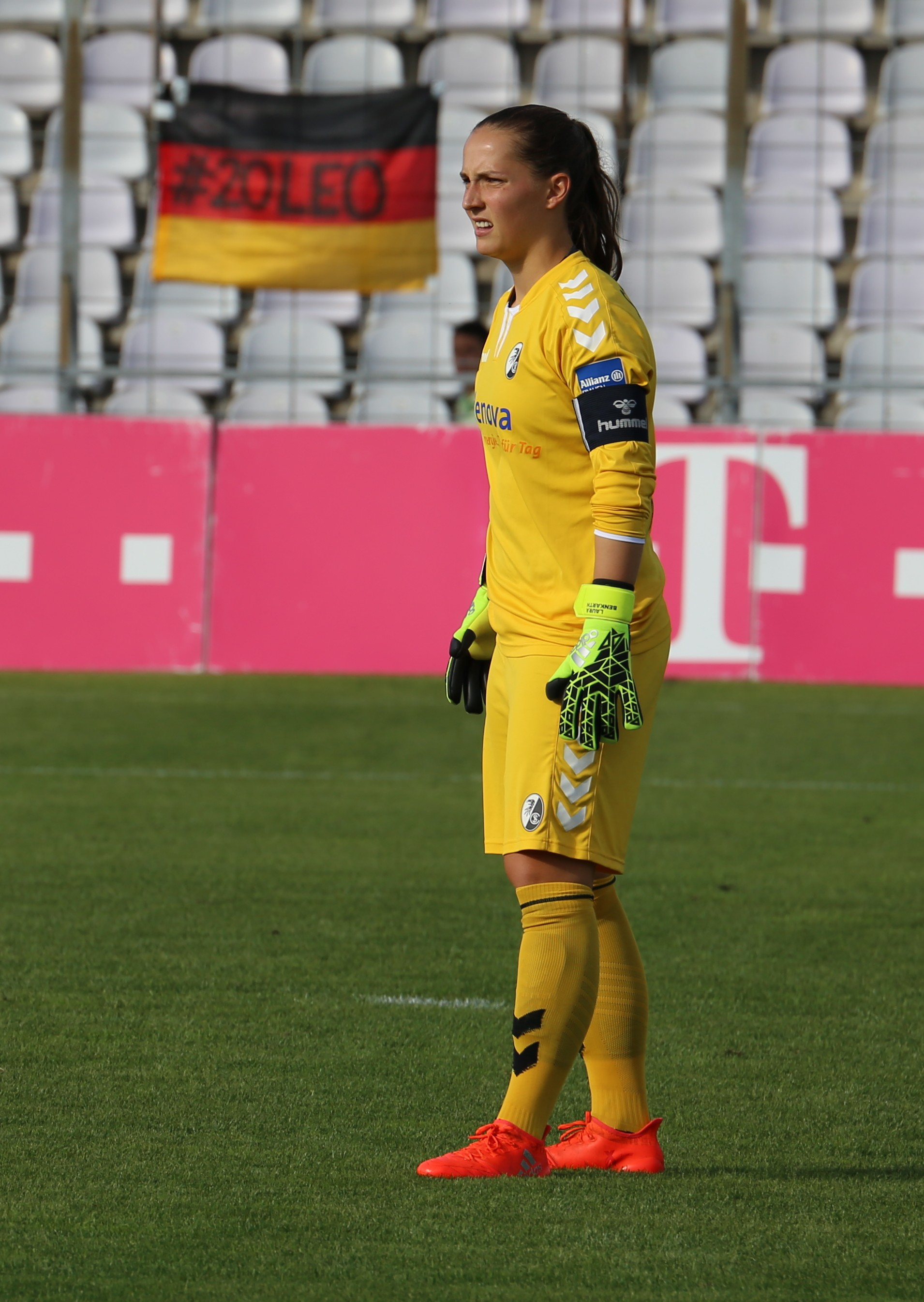 Laura Benkarth, SC Freiburg, beim Frauen-Bundesliga-Spiel FC Bayern München gegen SC Freiburg am 3. September 2016 im Stadion an der Grünwalder Straße (Ergebnis war 1:1).